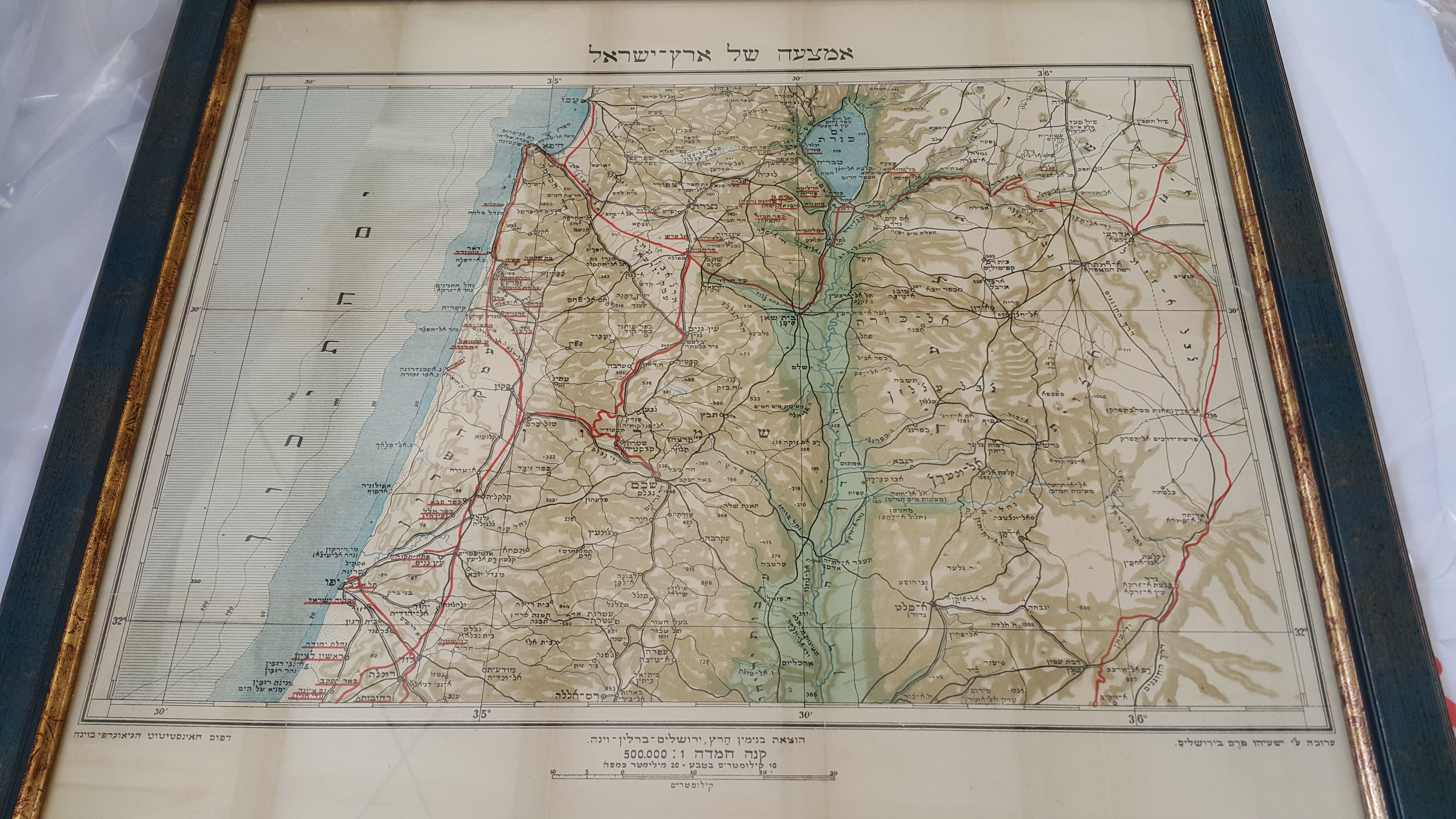 המפה האחרונה שהודפסה בדפוס וינה בשנת 1938